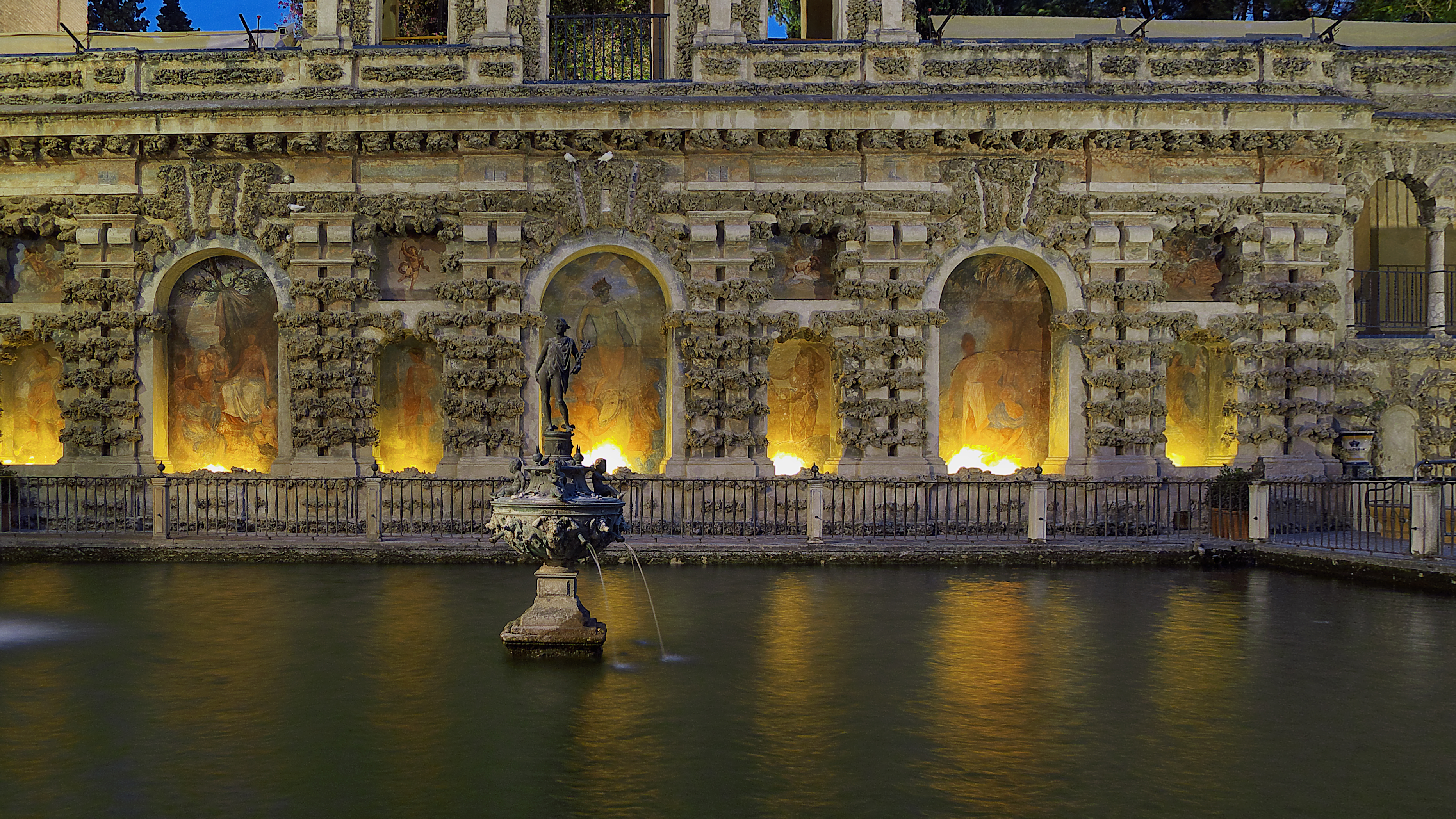 Reales Alcázares de Sevilla. Monumental alberca embellecida con la Fuente de Mercurio y la Galería del Grutesco.